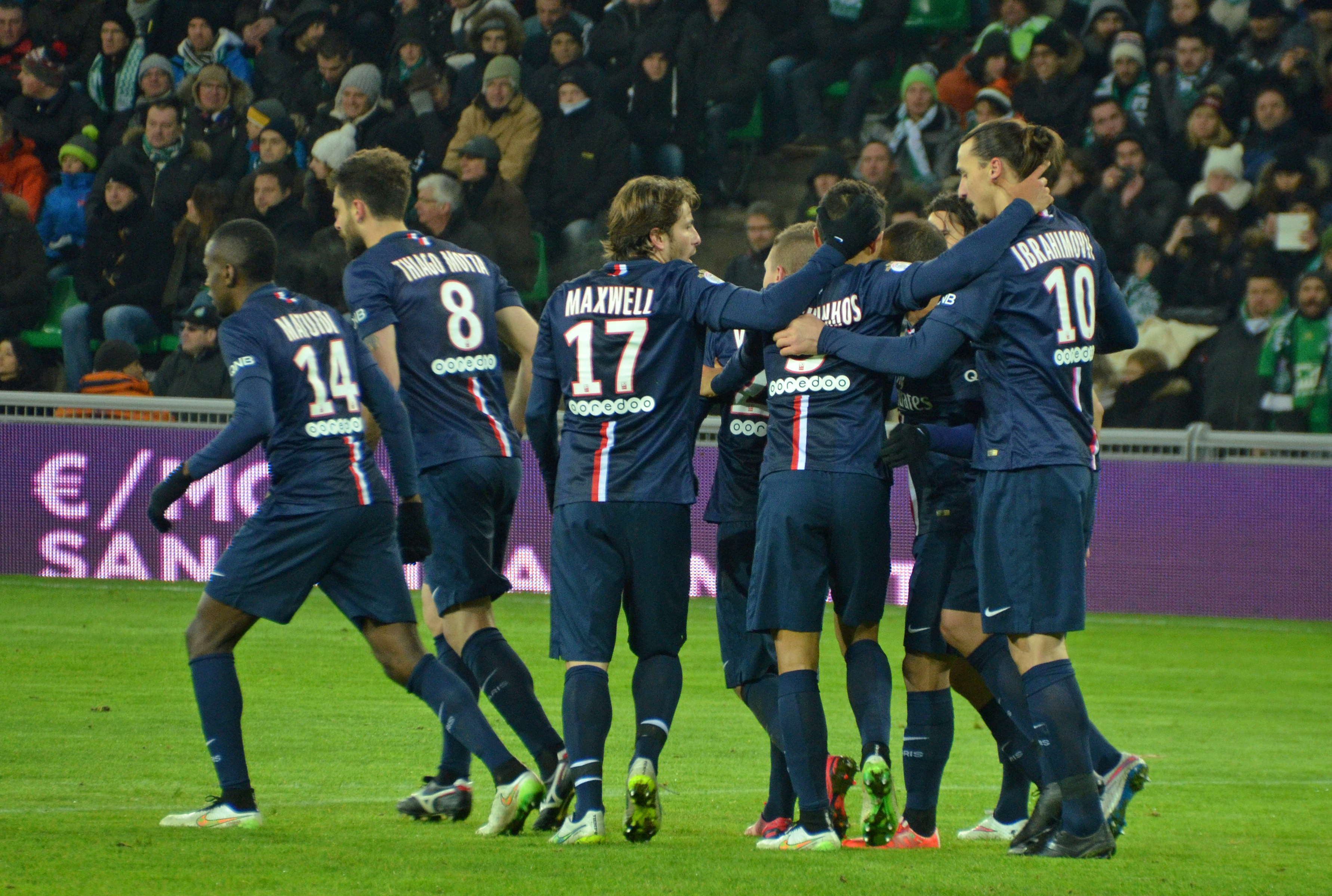 L'équipe du PSG durant la saison 2014-2015 à Geoffroy Guichard.